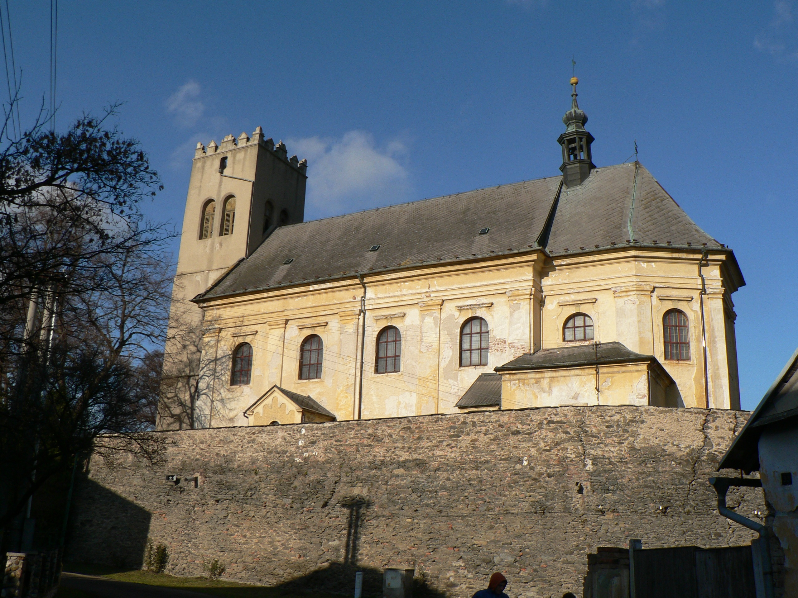 Kostel sv. Jiří v Nákle, okres Olomouc.